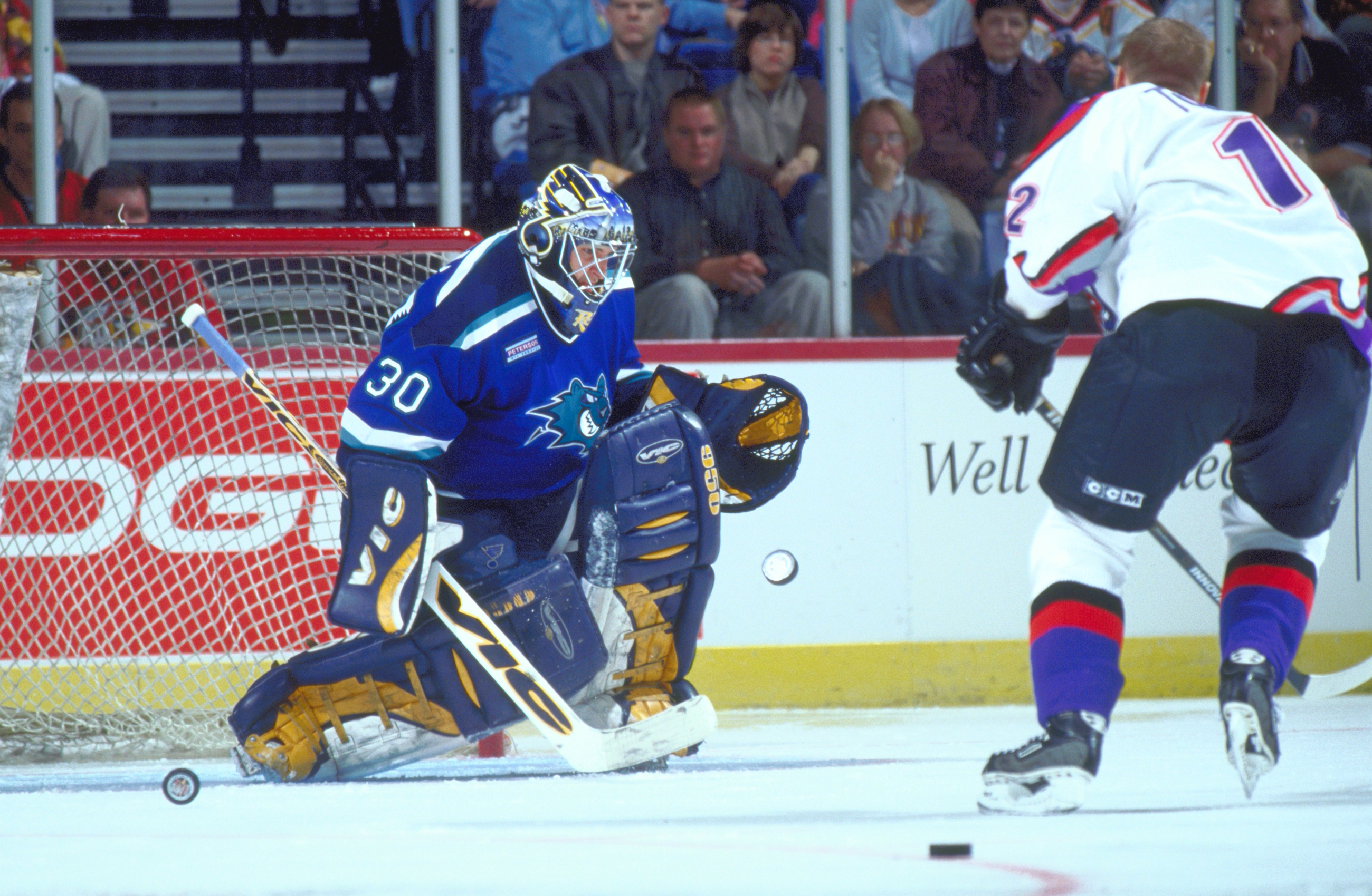 ahlstar0136